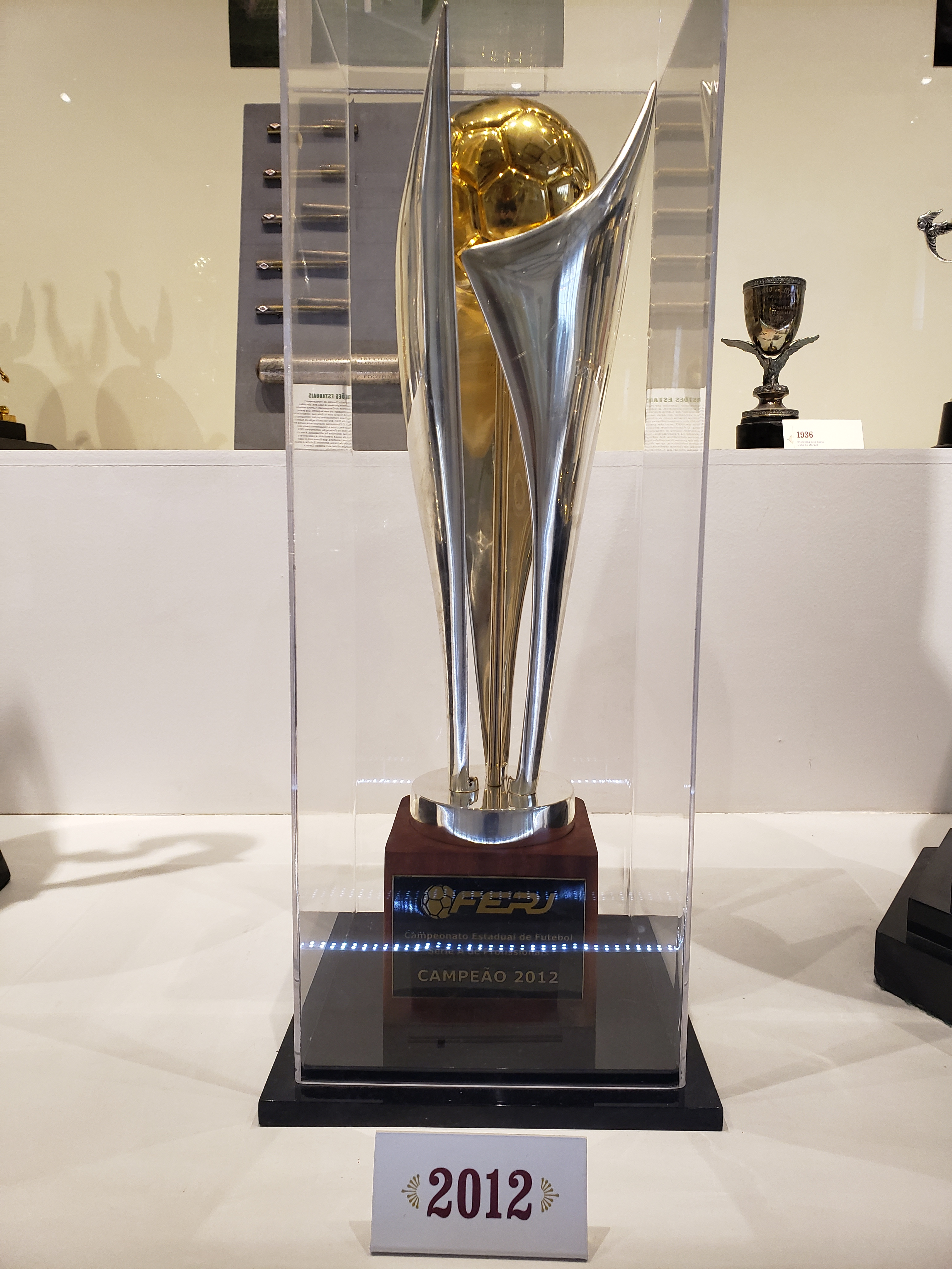 Taça do Campeonato Carioca de Futebol de 2012, conquistado pelo Fluminense Football Club contra o Botafogo.